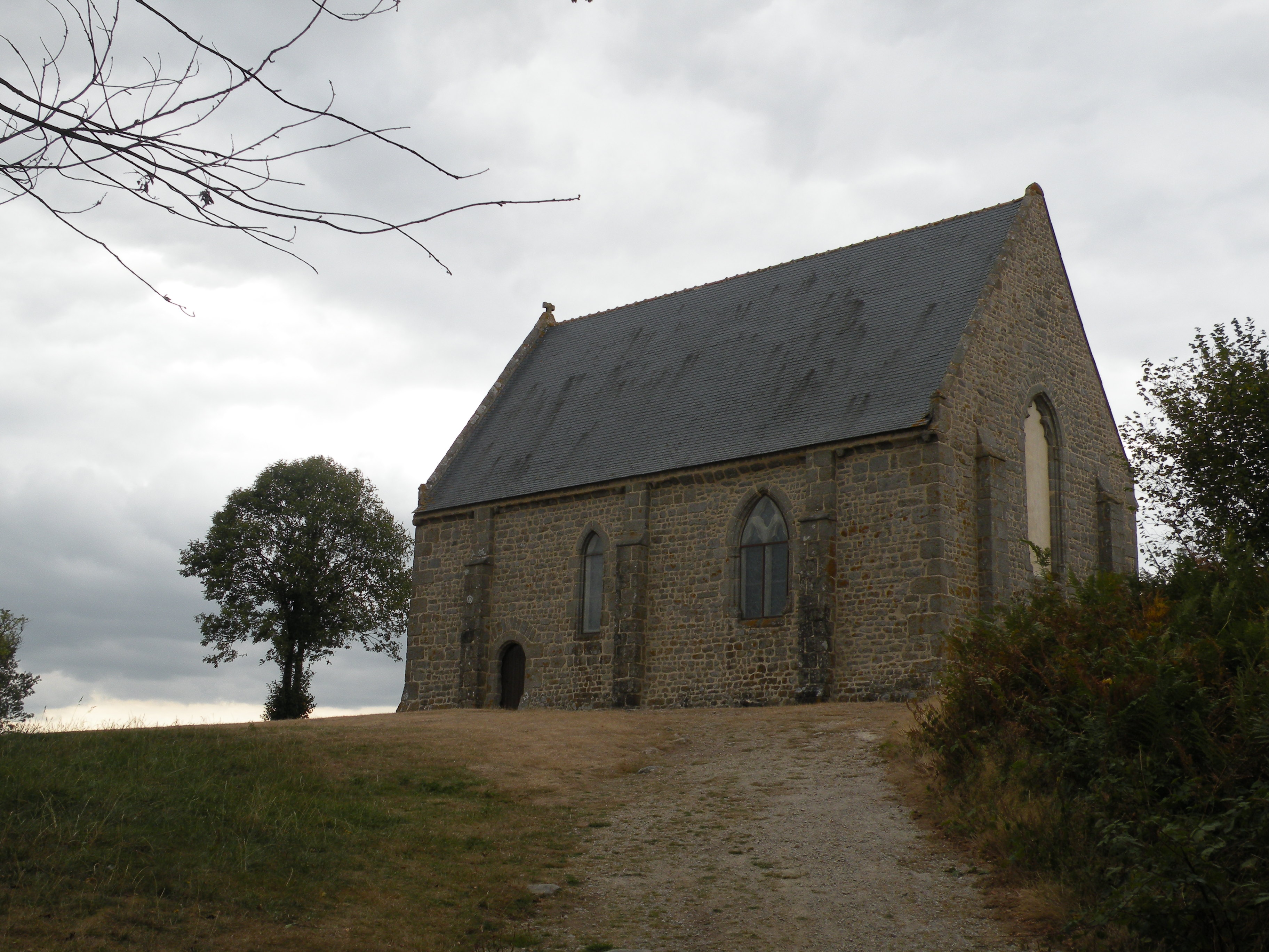 Chapelle Saint-Michel du Montaigu